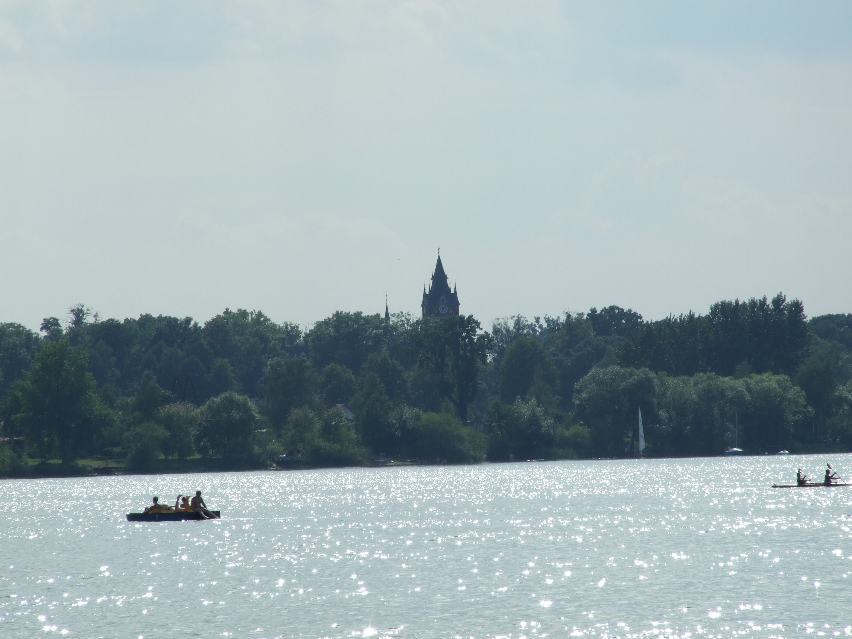 Jezioro Pławniowice